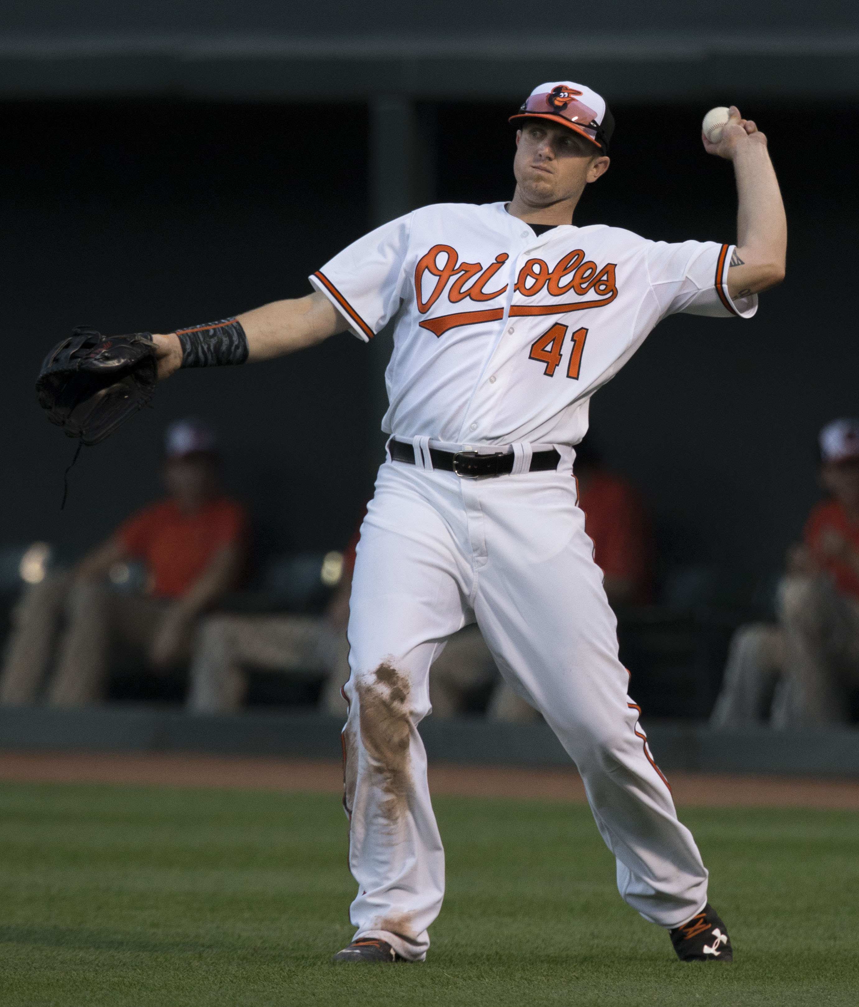 Phillies at Orioles 6/16/15